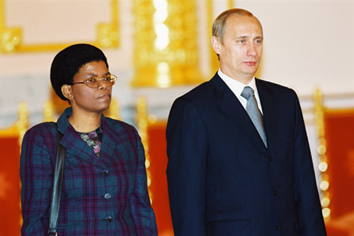 МОСКВА, БОЛЬШОЙ КРЕМЛЕВСКИЙ ДВОРЕЦ. Церемония вручения верительных грамот послами иностранных государств. Верительную грамоту вручает посол Ботсваны Наоми Эллен Маджинда.